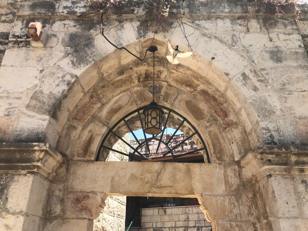 النجمكة الإسلاميّة كما تزيّن بها مبنى من مباني دير ياسين